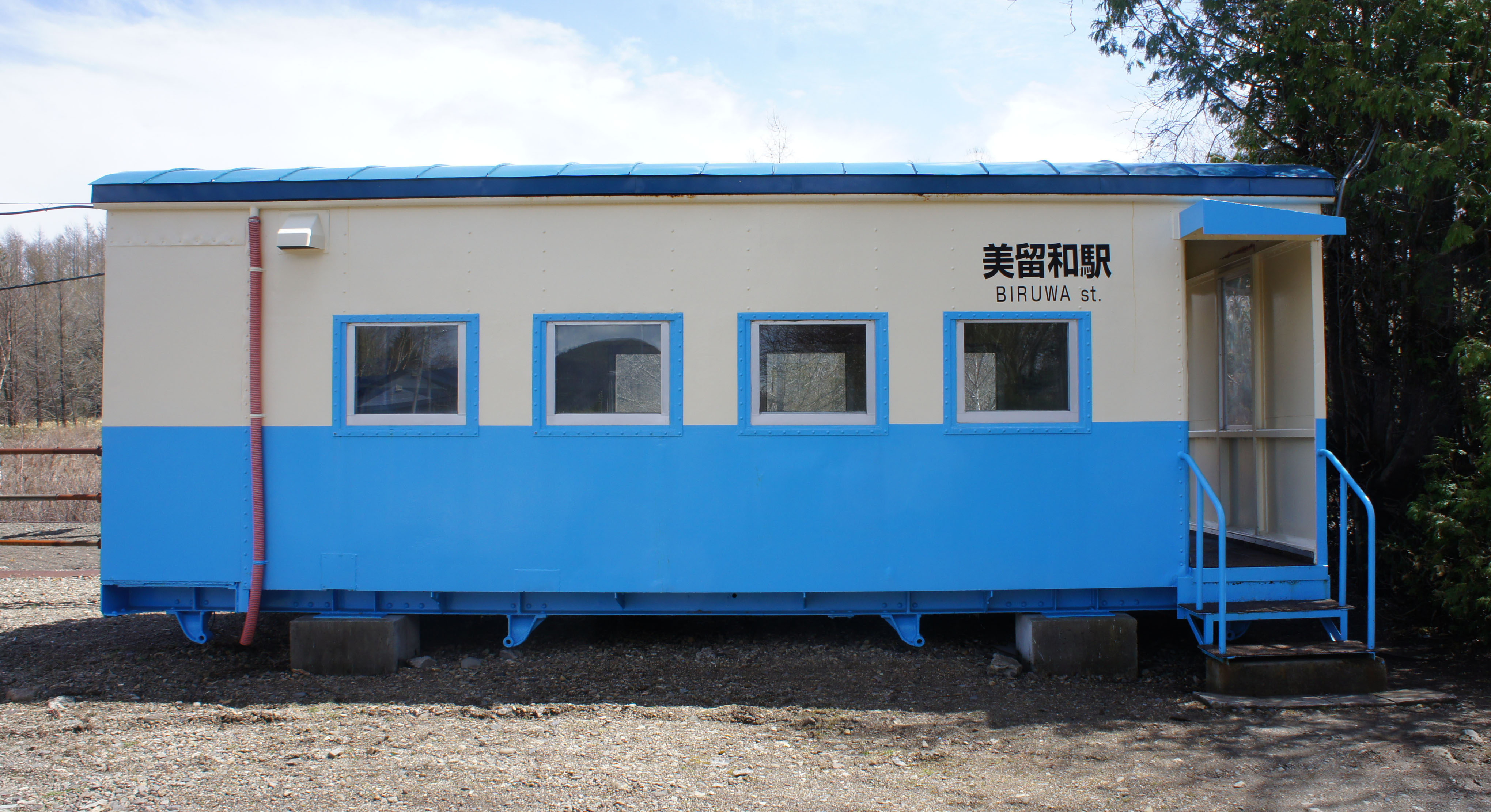 JR釧網本線・美留和駅の駅舎